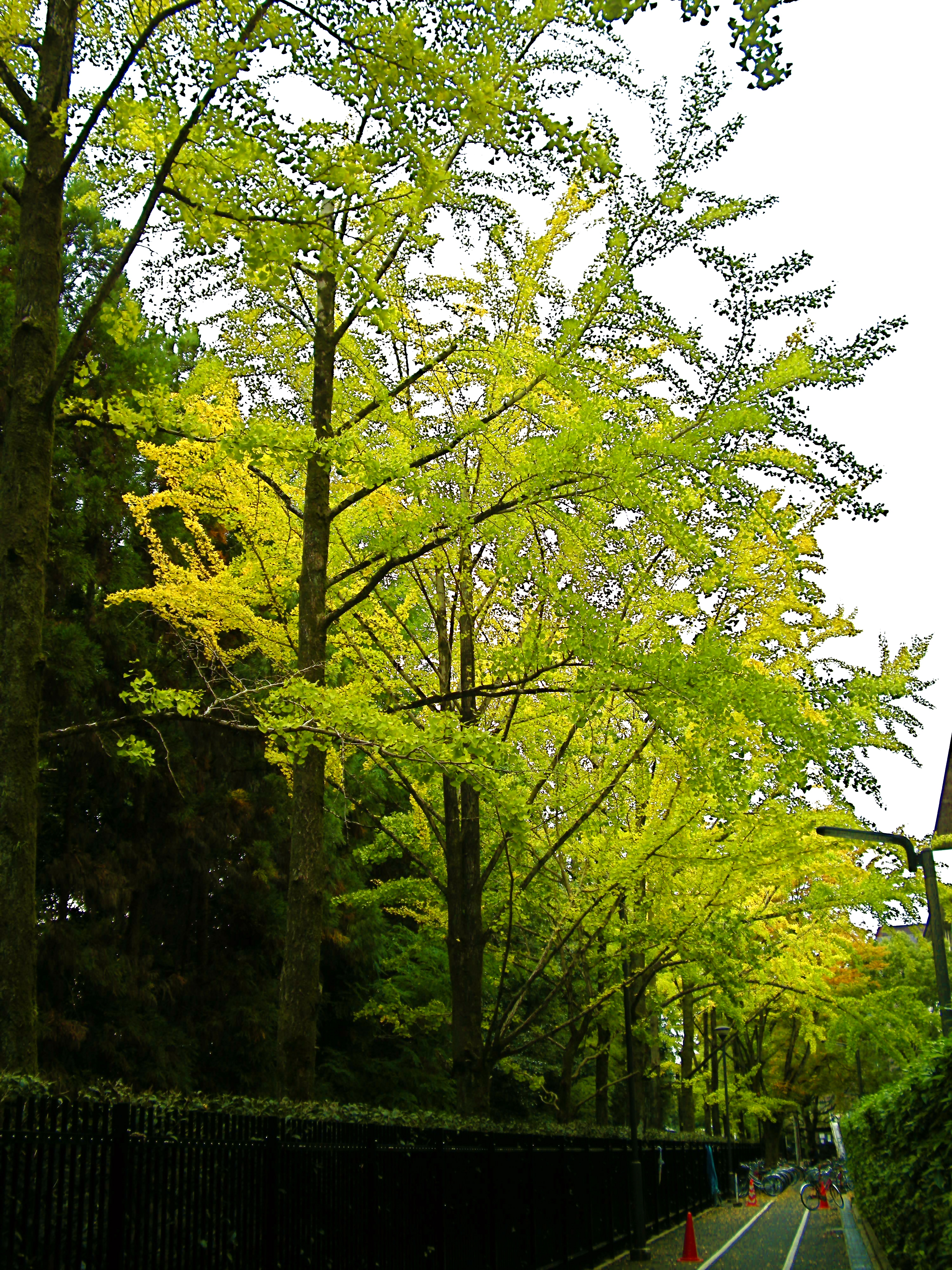 Gingko Trees at Kinugasa Campus, Ritsumeikan University, Kyoto, Japan